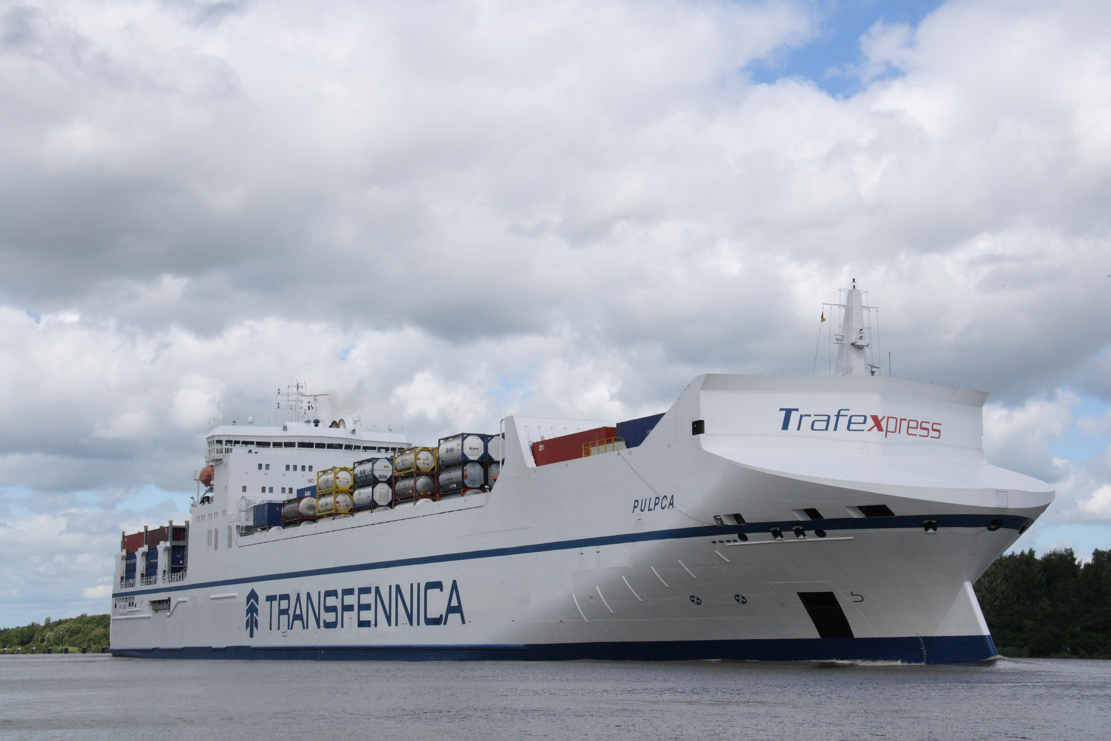 Schiffstyp: Ro-ro cargo Baujahr: 2008 Länge x Breite: 205 m X 26 m Bruttoregistertonnen: 28289, Tragfahigkeit: 18250 t Eingetragene Geschwindigkeit (Max./Durchschnitt): 16 / 14.6 knots Flagge: Netherlands [NL] Rufzeichen: PHMT IMO: 9345386, MMSI: 245097000